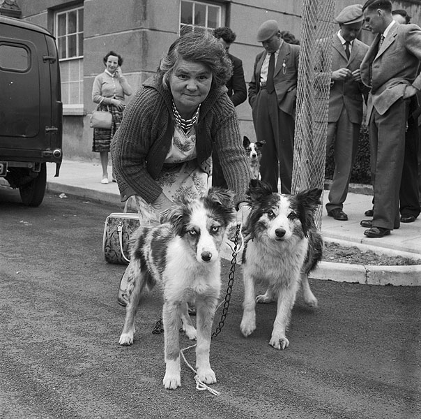 Teitl Cymraeg/Welsh title: Sefydlu'r Gymdeithas Cwn Defaid Glas Cymreig Ffotograffydd/Photographer: Geoff Charles (1909-2002) Dyddiad/Date: June 22, 1963 Cyfrwng/Medium: Negydd ffilm / Film negative Cyfeiriad/Reference: (gch31622) Rhif cofnod / Record no.: 3471642 Rhagor o wybodaeth am gasgliad Geoff Charles yn Llyfrgell Genedlaethol Cymru More information about the Geoff Charles Collection at the National Library of Wales